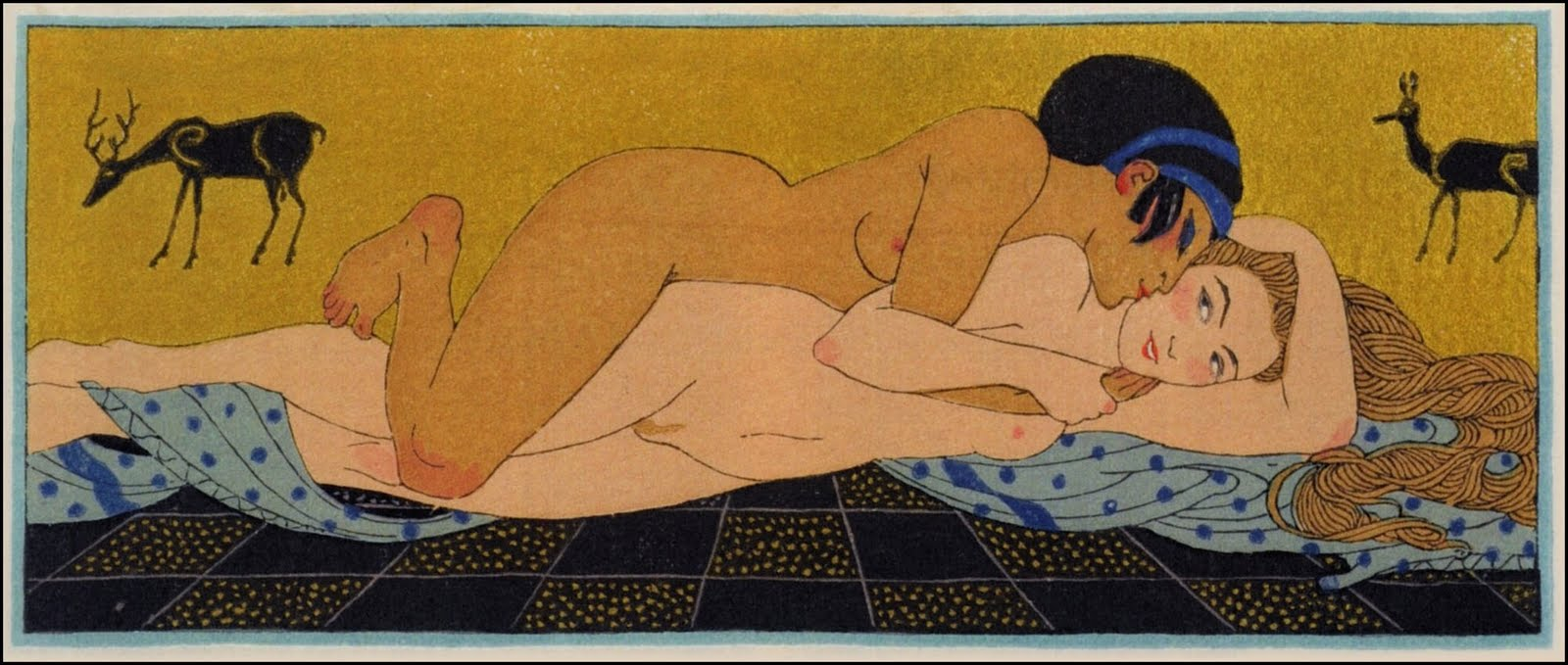 Les Chansons de Bilitis par George Barbier, 1922.